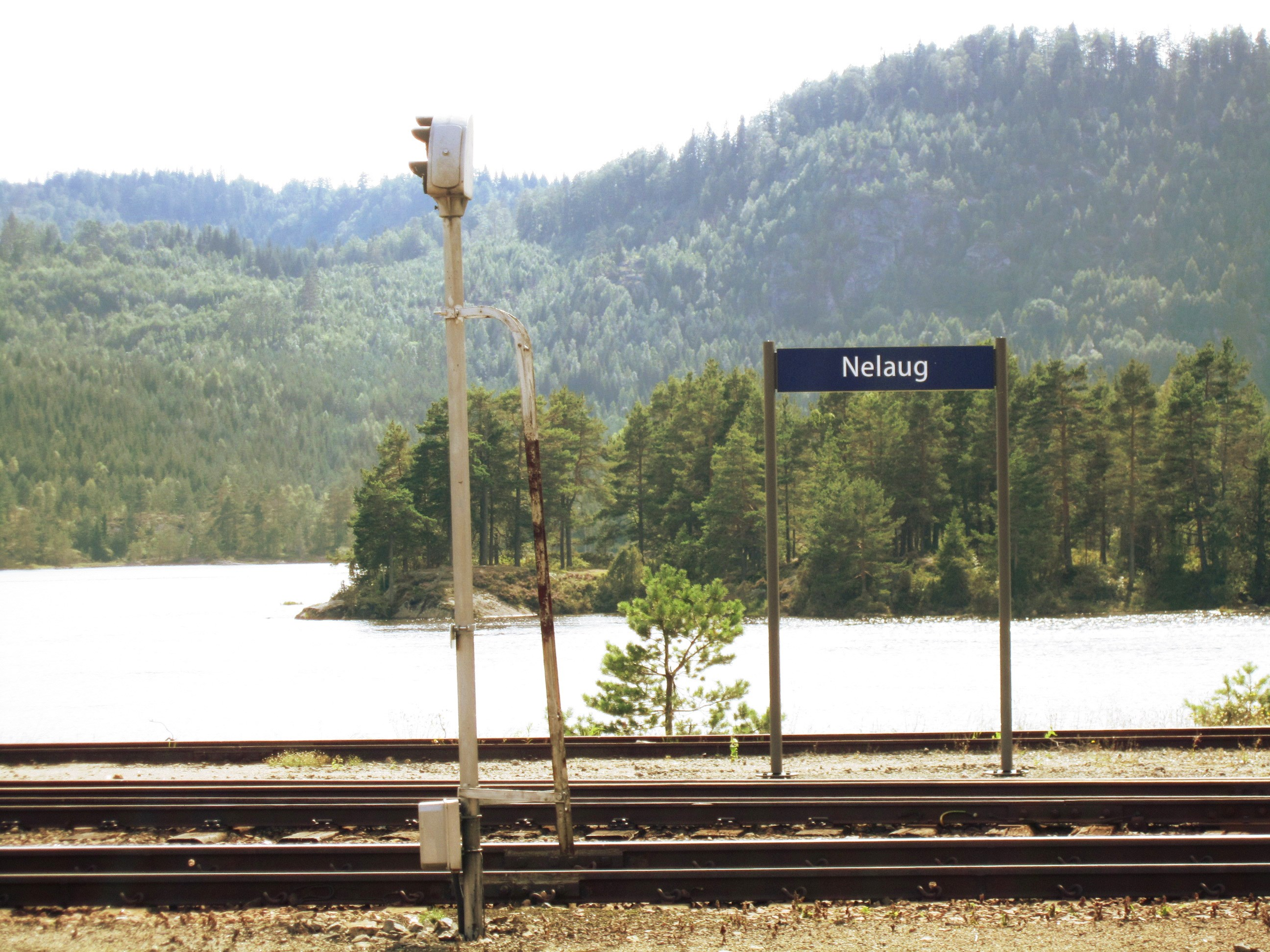 Nelaug stasjon ligger ved sjøen Nelaug.